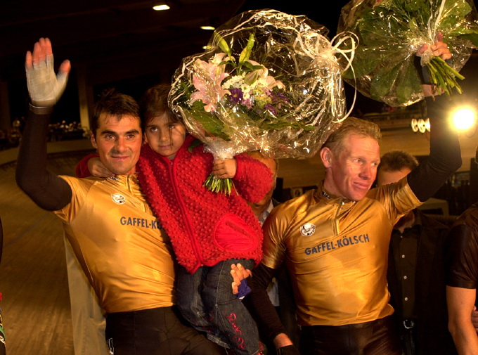 Andreas Kappes (l.) und Etienne De Wilde (r.) bei einem Bahnrad-Meeting auf der Albert-Richter-Radrennbahn in Köln